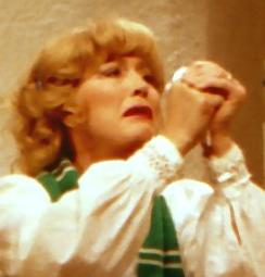 Birgitta Andersson i "Omaka par" på Maximteatern i Stockholm 1988, cropped version of File:Nyman Andersson 1988a.jpg